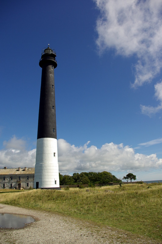 Vaade Sõrve tuletornile Sõrve sääre poolt